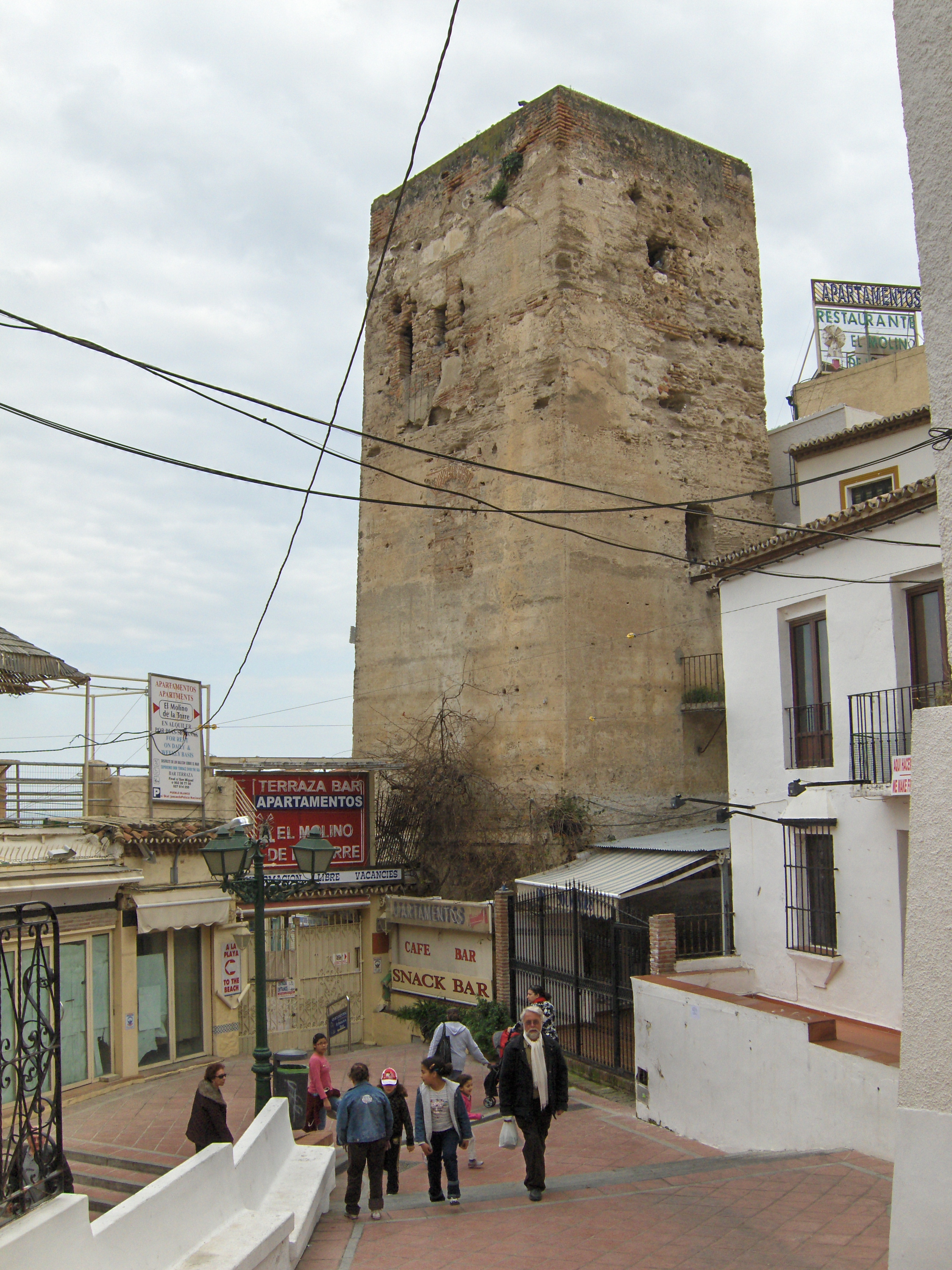 Torre de los Molinos, Torremolinos, Málaga